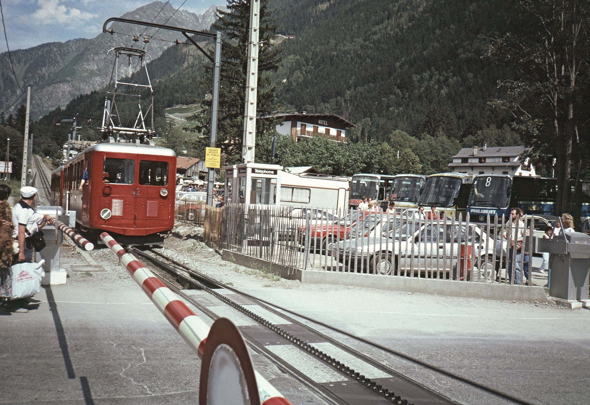 Passage à crémaillère a Chamonix